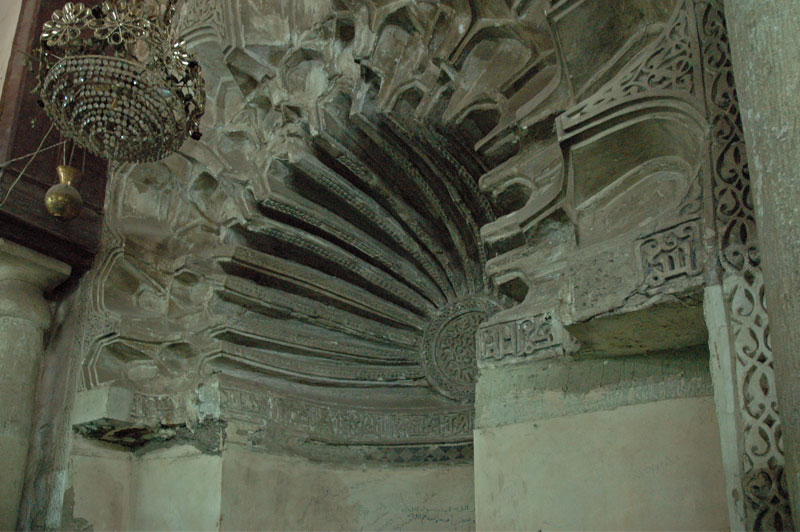 Mashad de Sayyida Ruqayya. El Caire, Egipte